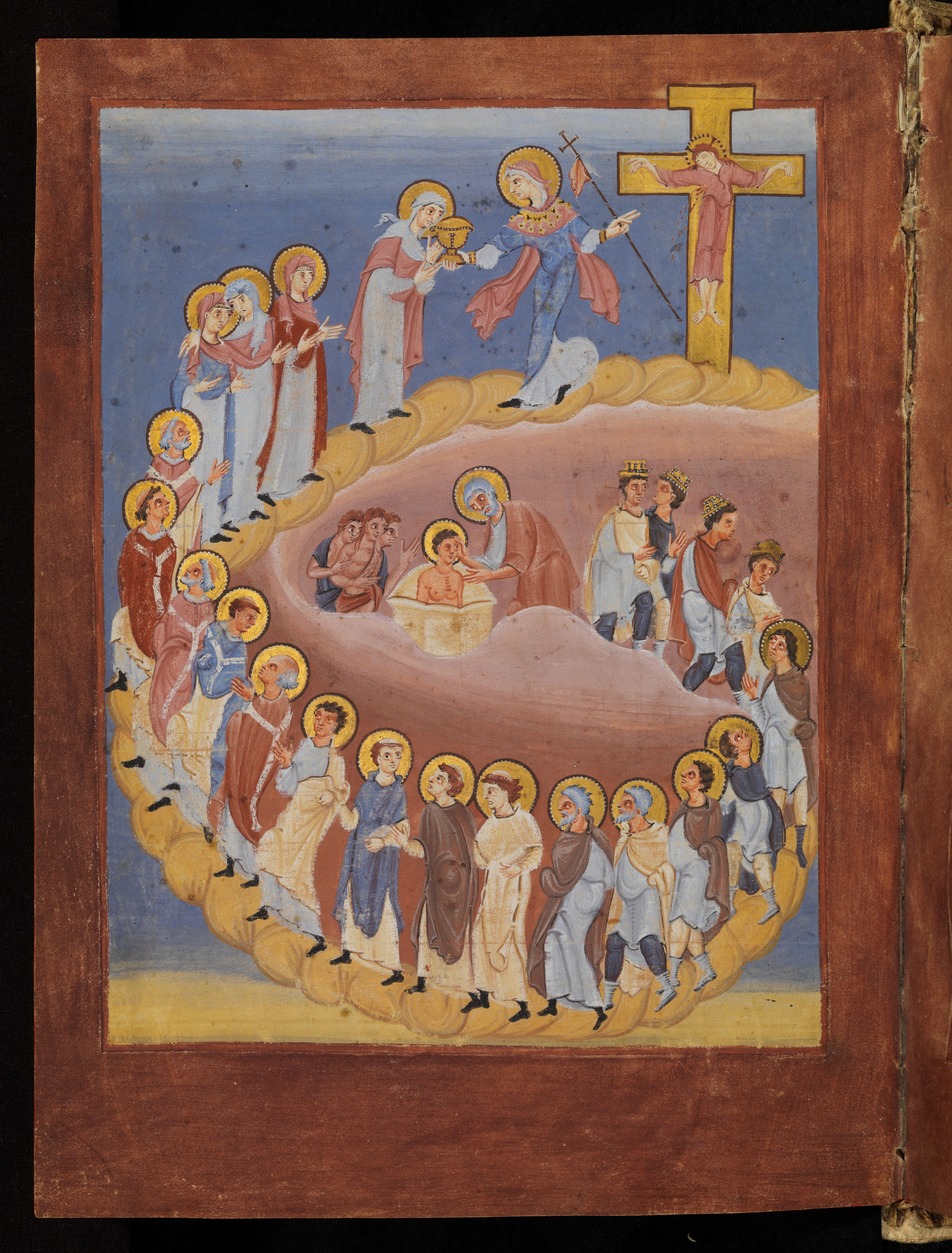 Staatsbibliothek Bamberg Msc. Bibl. 22, fol. 4v: Der Zug der Auserwählten. Reichenauer Buchmalerschule, um 1000